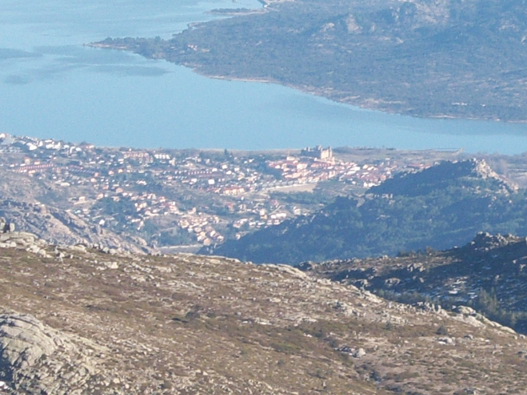 Municipio de Manzanares el REal visto desde la cima del Cerro de Valdemartín (Comunidad de Madrid, España).